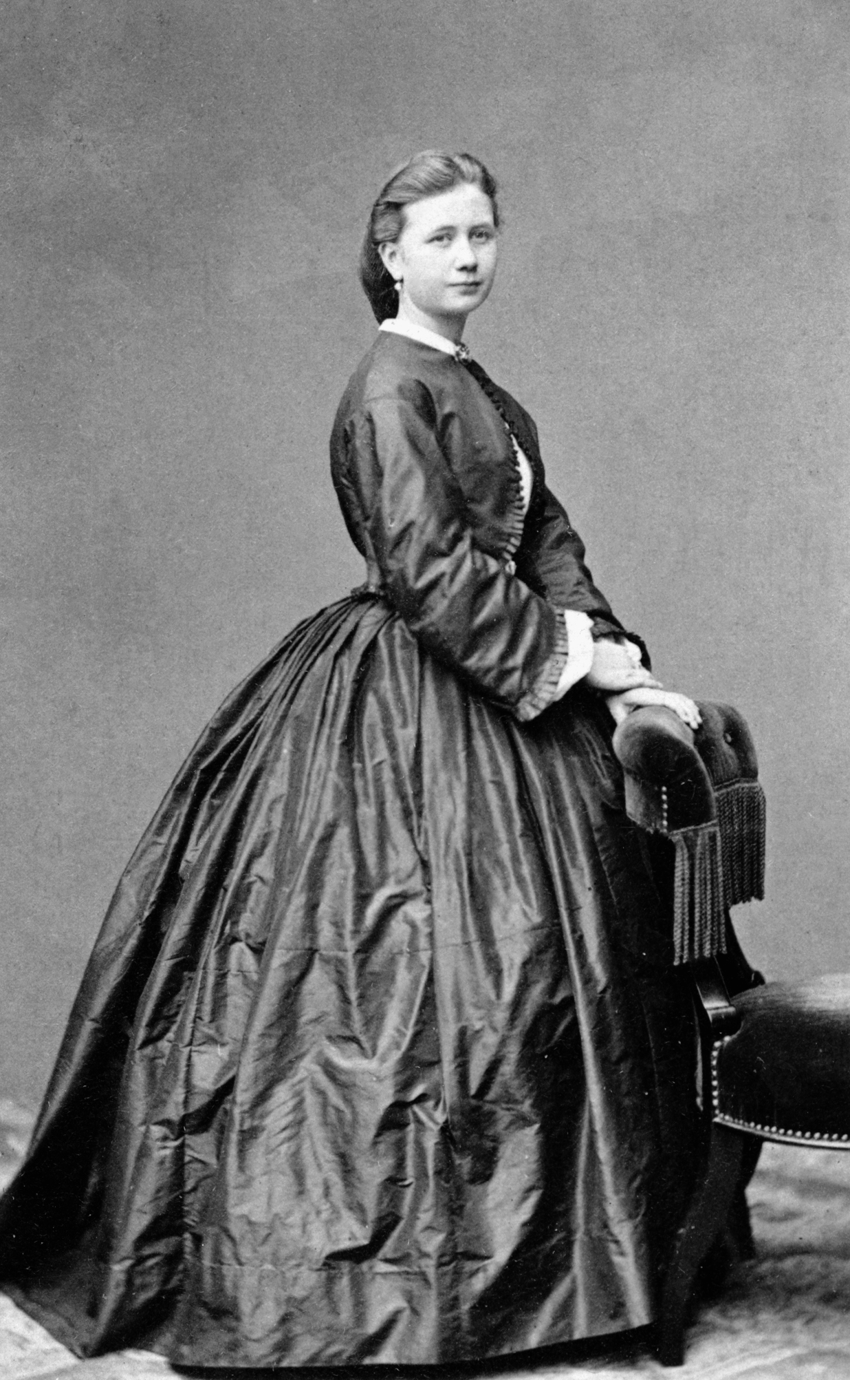 Ida Landelius, skådespelare vid Kungliga Dramatiska teatern 1863